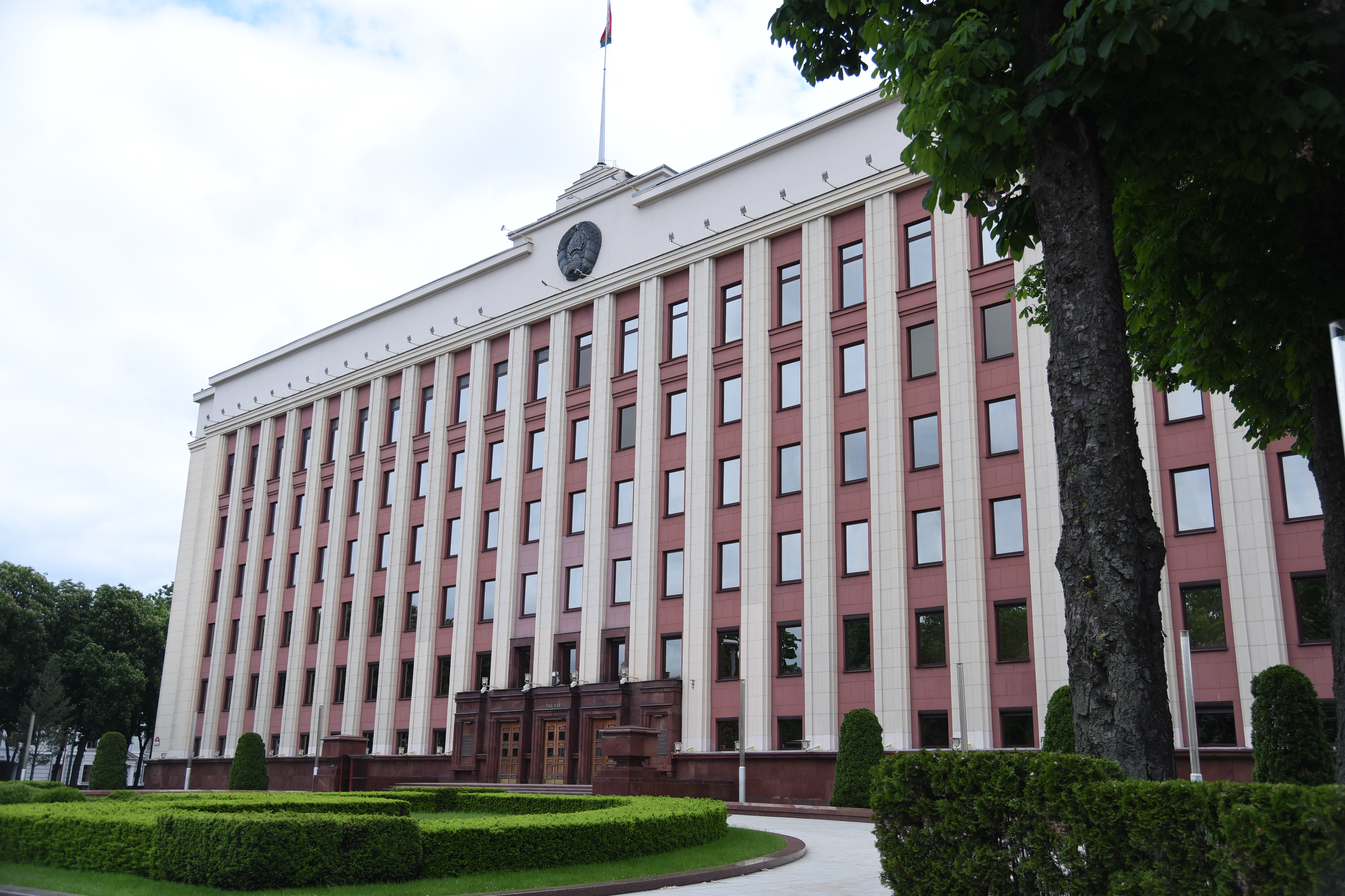 Рэзідэнцыя прэзідэнта, г. Мінск